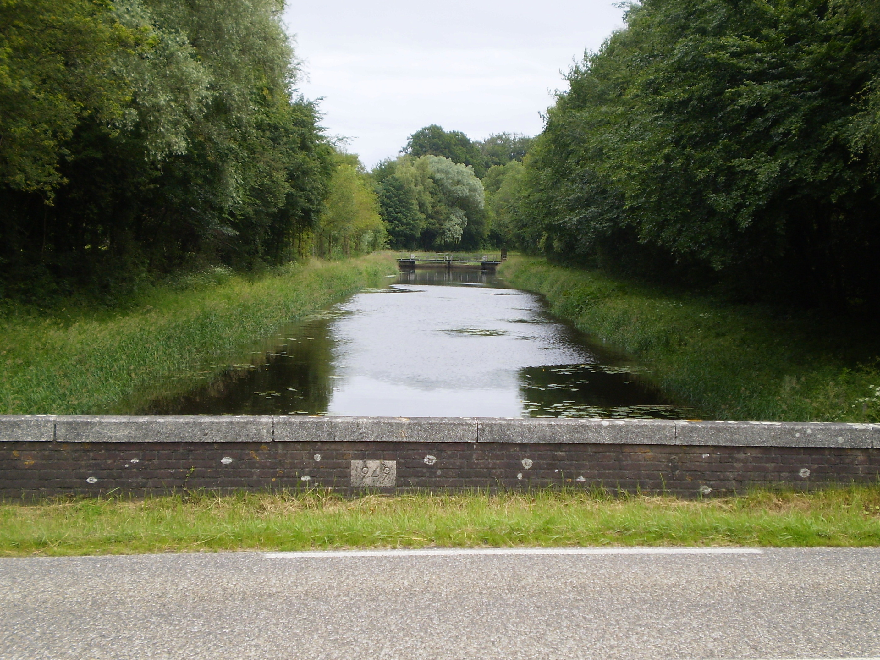 Bielheimerbeek tussen Westendorp en Doetinchem, NL, vanaf de Varsseveldseweg